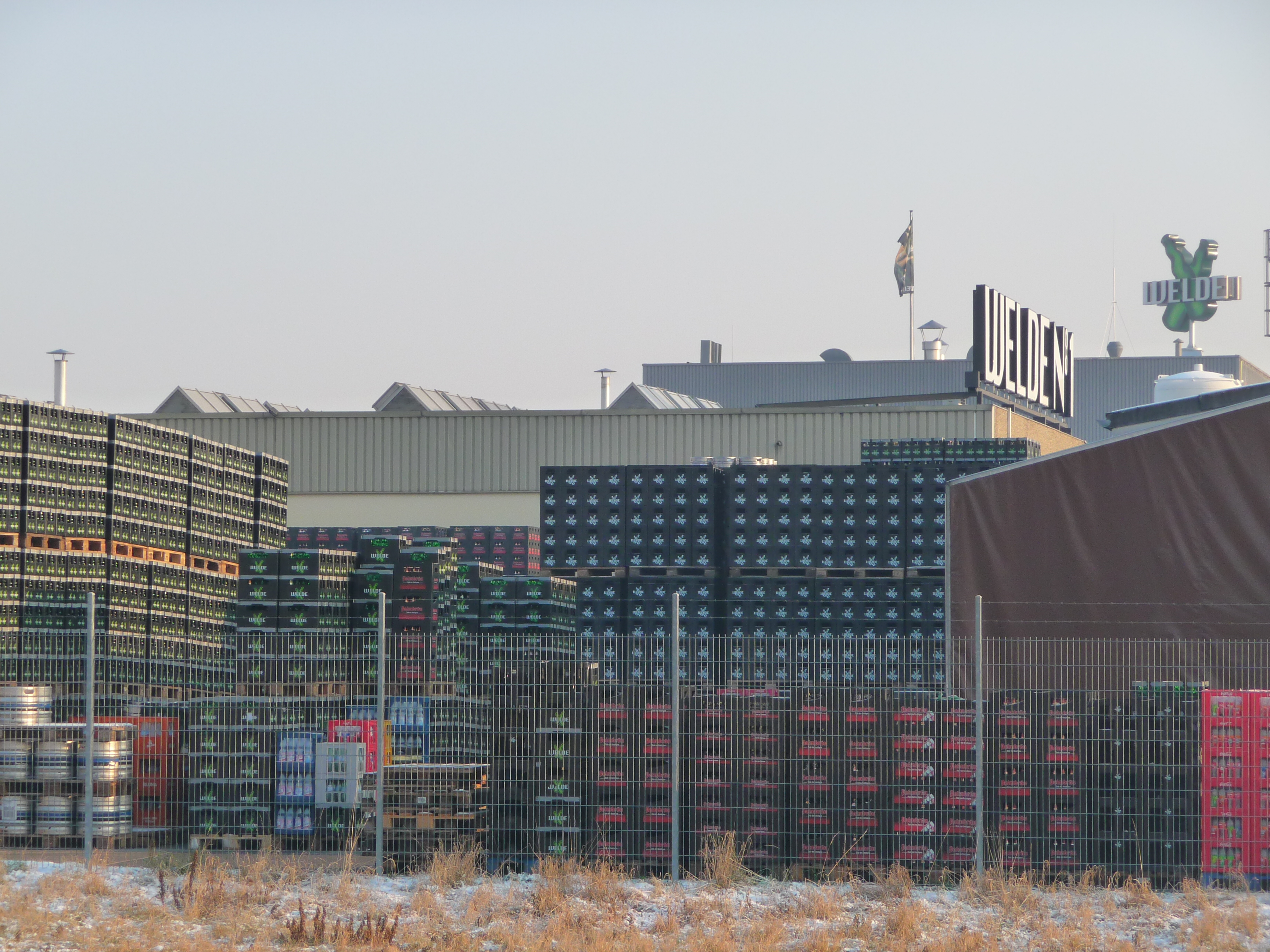 Weldbräu in Plankstadt (Rückansicht von Norden)